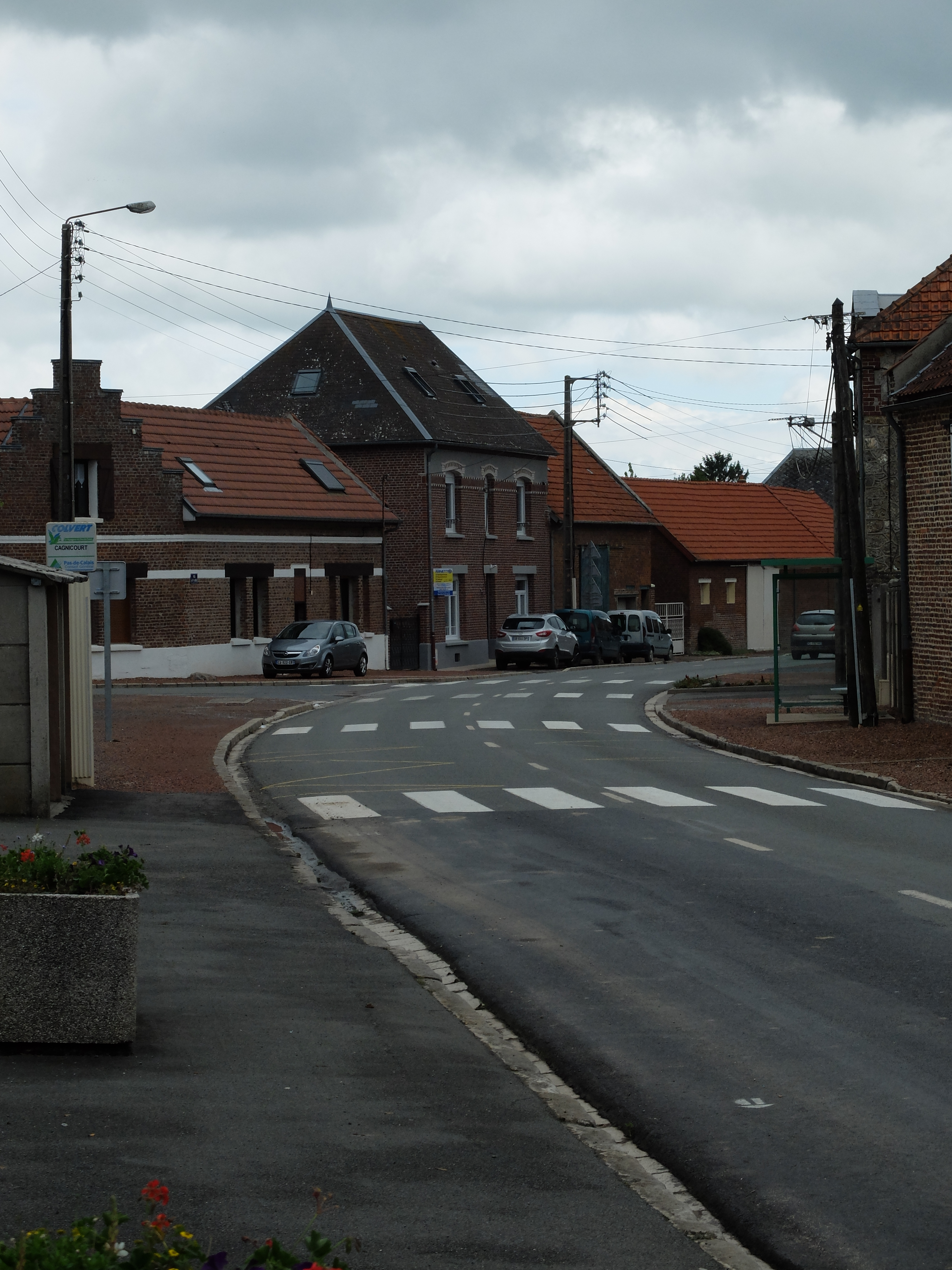 Vue de la rue du Général de Gaulle à Cagnicourt.